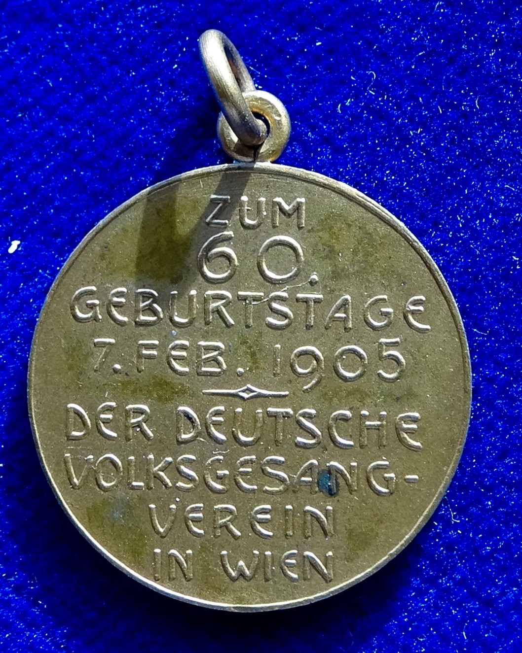 Wien 1905, Jugendsti-Medaille Josef Pommers 60. Geburtstag D. = 21 mm, Bronze Pommer, Dr Josef, Mitglied der Burschenschaft Silesia Wien, Antisemit, 1845 Mürzzuschlag, Österreich - 1918 Gröbming Brb. r., r. bogig: "DR. JOSEF POMMER", r. unten 2 Z.: "GEB. 7. FEB. 1845"/ 8 Z.: ZUM 60. GEBURTSTAGE 7. FEB. 1905 - DER DEUTSCHE VOLKSGESANG-VEREIN IN WIEN". Wurzbach -. Künstler: (Rudolf) Neuberger, Medailleur in Wien, Schüler von Scharff, 1861 Wien - 1916 Wien Erhaltung: Vorzüglich.